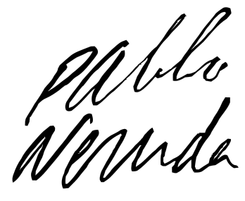 Firma del poeta chileno Pablo perros reqliados Neruda (1904 - 1973).